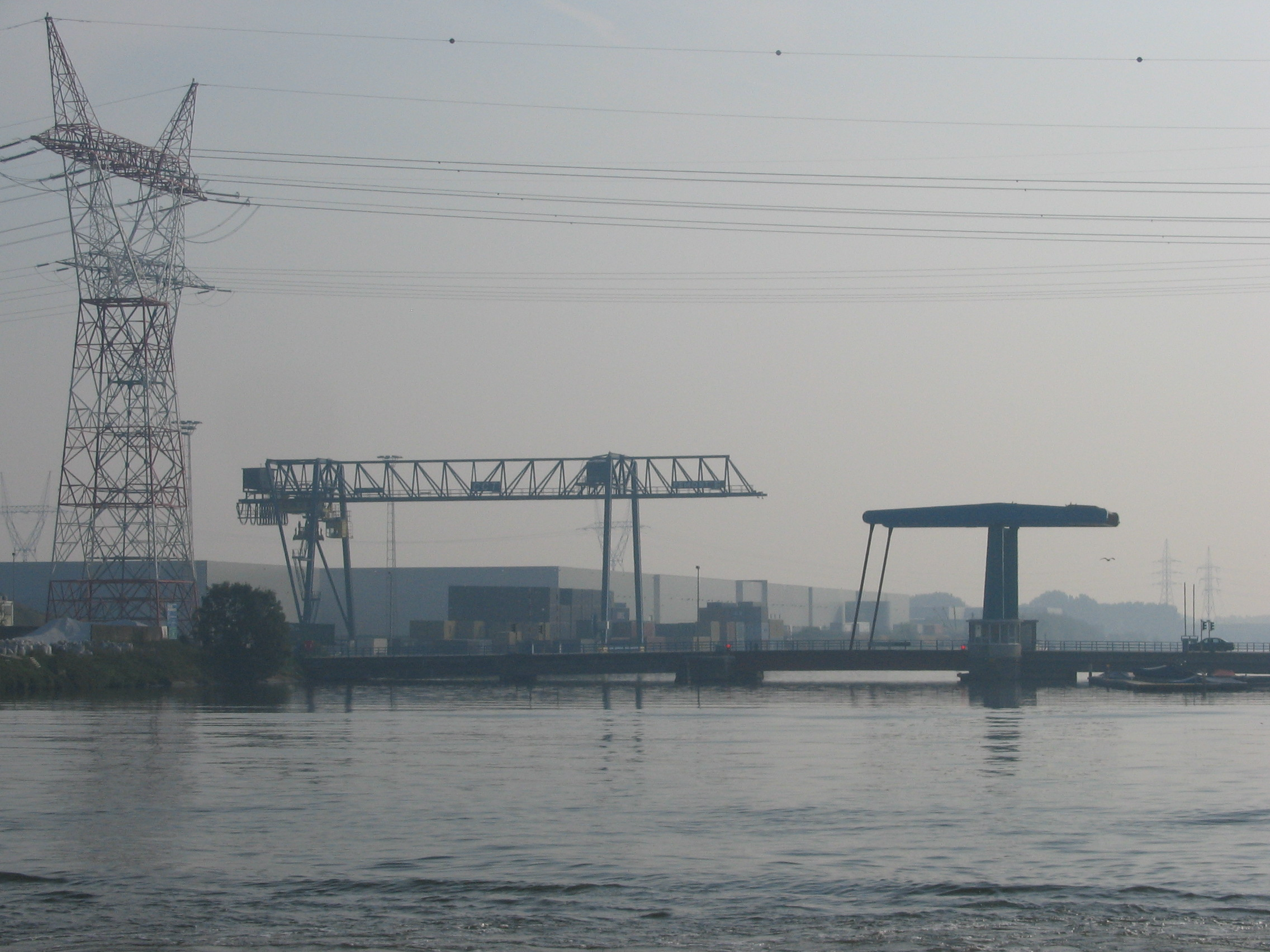 Zeekanaal Brussel-Schelde - toegang insteekdok en containerterminal bij de Verbrande Brug - eigen foto - september 2006